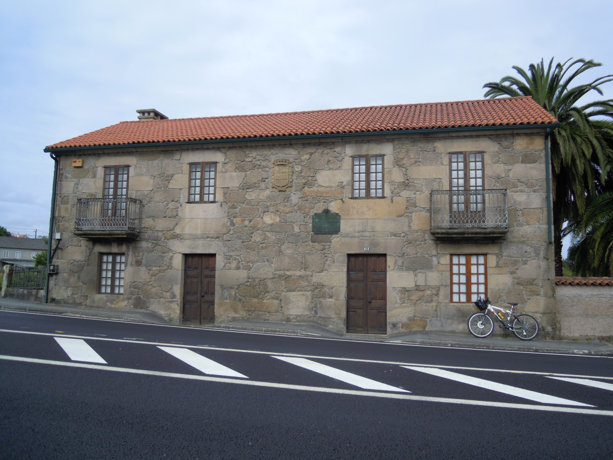 Casa natal de Ángel Amor Ruibal en Cangrallo (Barro).